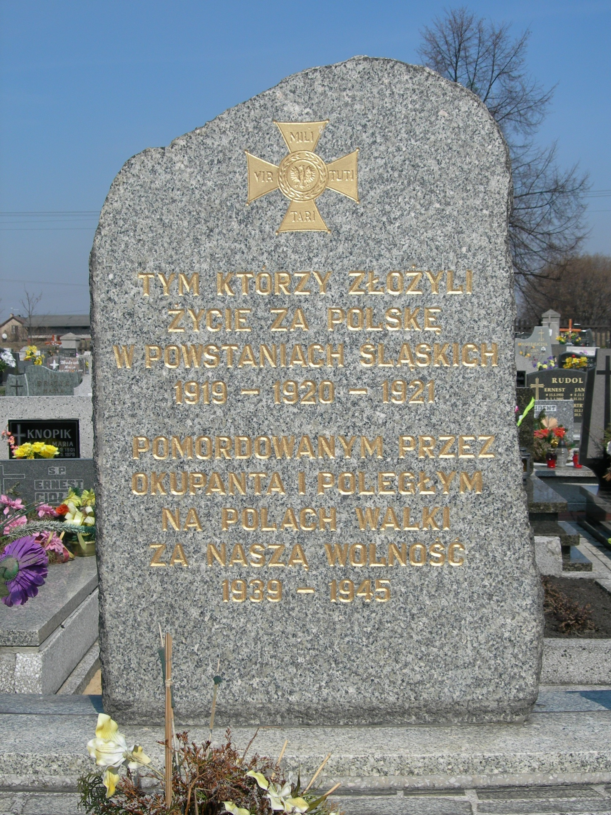 Pomnik poległych w powstaniach śląskich oraz w II wojnie światowej na cmentarzu w Dębieńsku. 2006